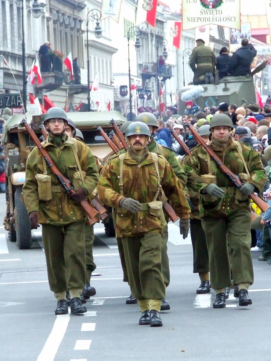 pl:1 Samodzielna Brygada Spadochronowa, reconstruction